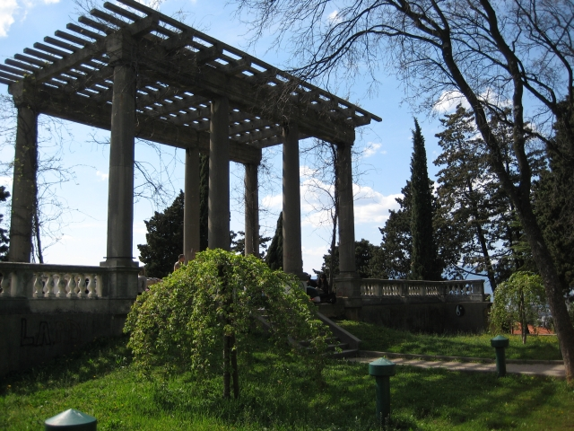 Vodosprem na Sušaku u parku Ivo Lola Ribar, Rijeka